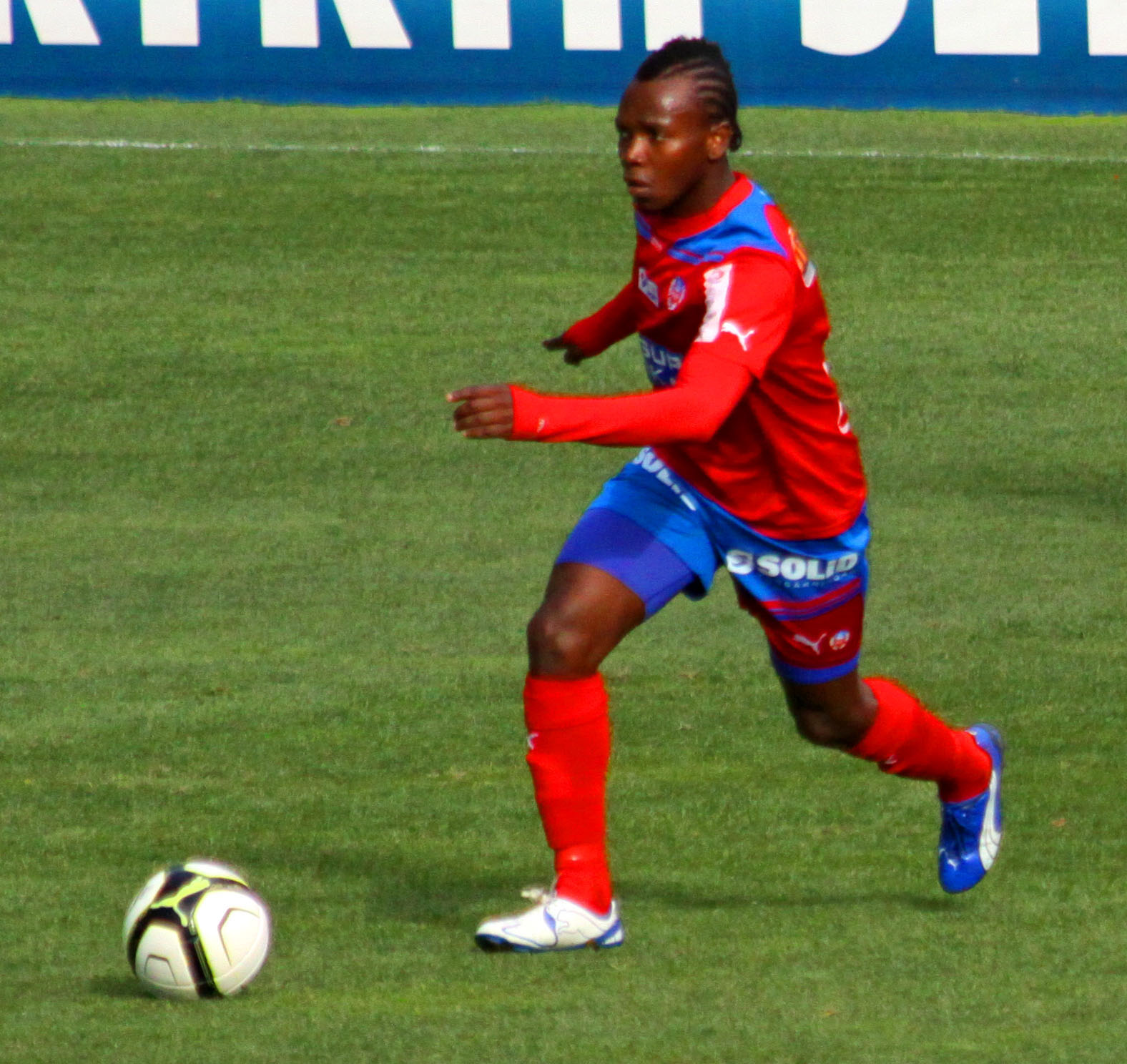 May Mahlangu